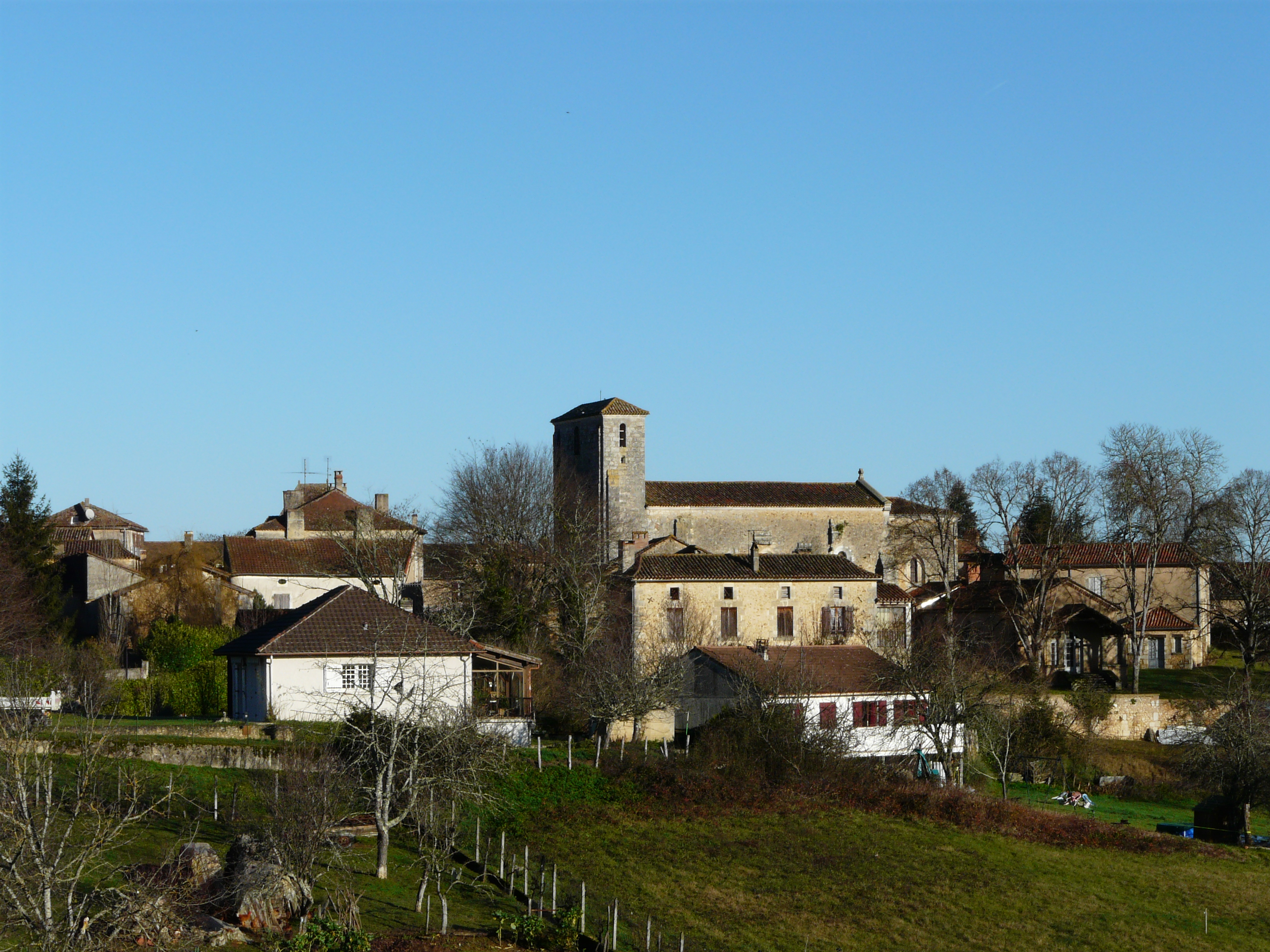 Le village de Saint-Maime-de-Péreyrol, Dordogne, France.